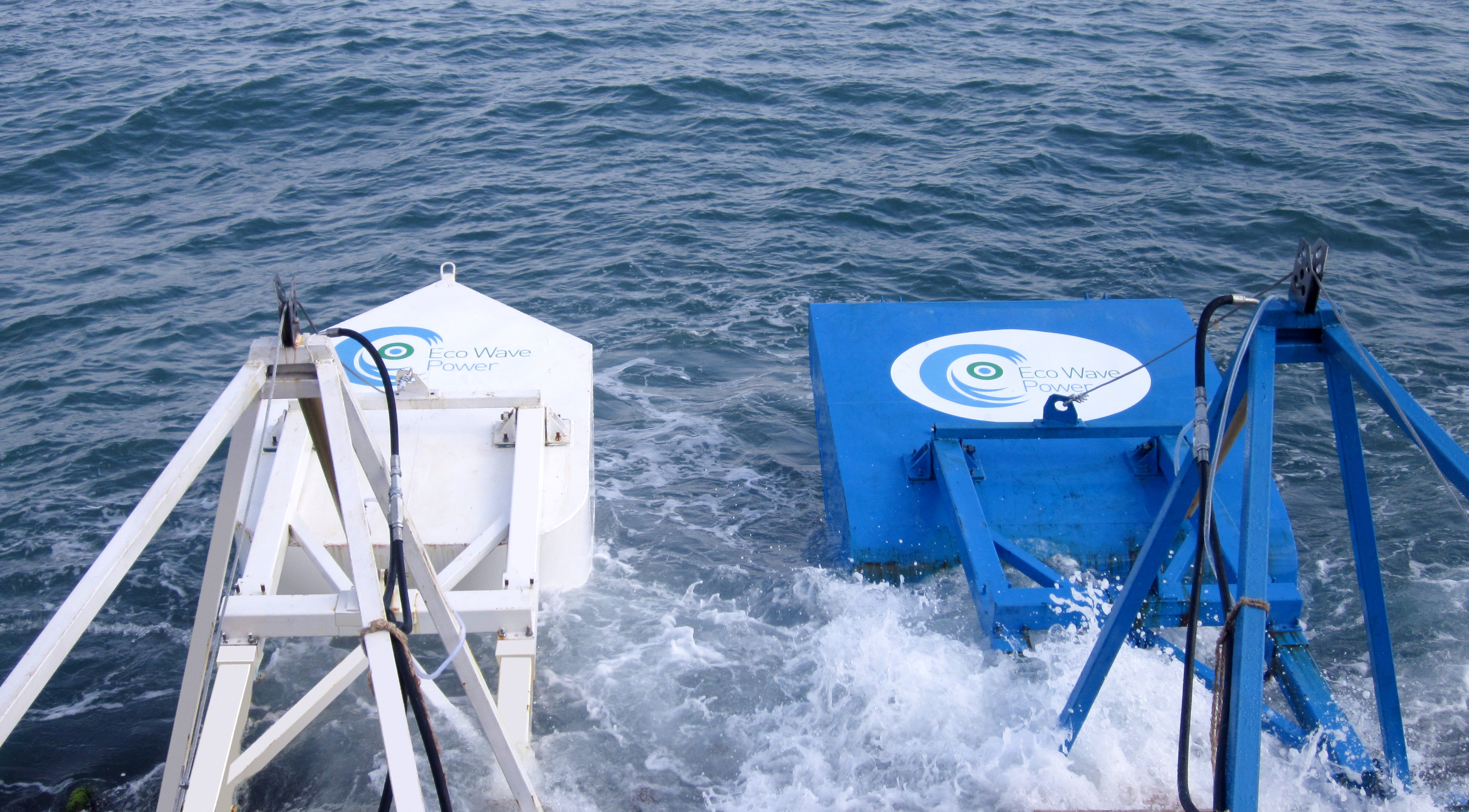 מצופים של חברת אקו וייב פאוור